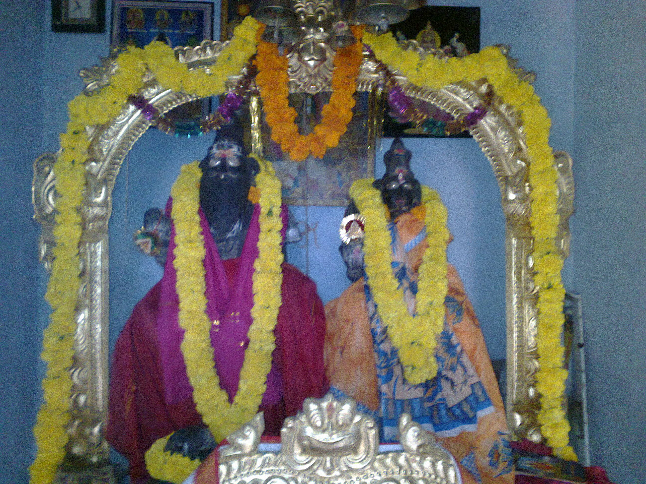 శ్రీ మద్విరాట్ పోతులూరి వీరబ్రహ్మేంద్రస్వామి వారి శిలా విగ్రహాలు